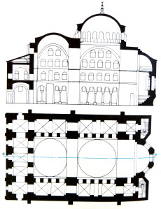 Konstantinápoly, Hagia Eiréné, újjáép. 532, alaprajz